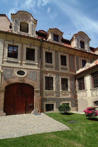 Kolovratsky palac